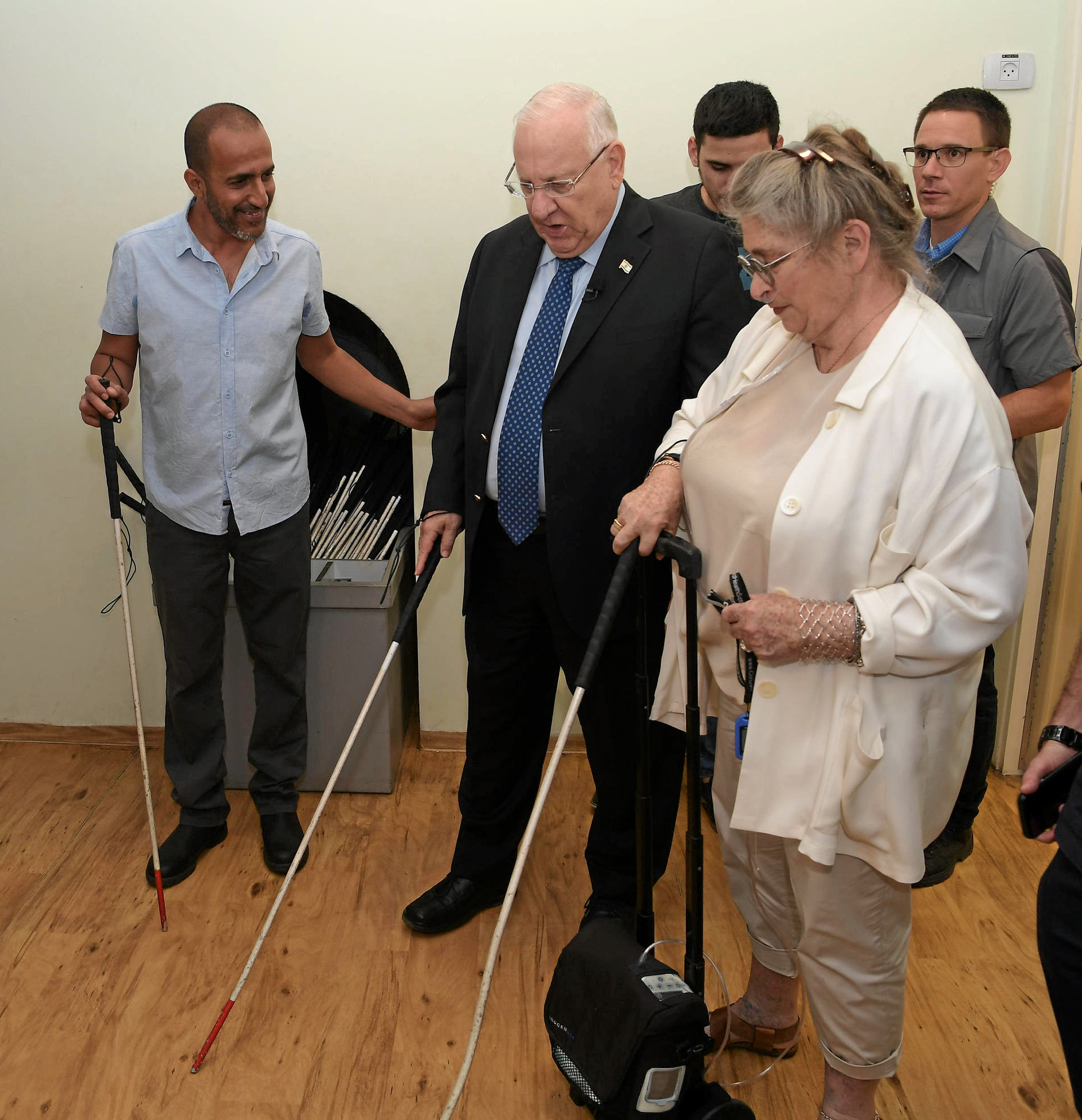 לרגל יום ה"בליינד דיי" (יום העיוורון) ראובן ריבלין נשיא מדינת ישראל ורעייתו נחמה ריבלין בביקור בתערוכת "דיאלוג בחשכה" במוזיאון הילדים בחולון נחמה וראובן ריבלין מהלכים בחשכה במוזיאון